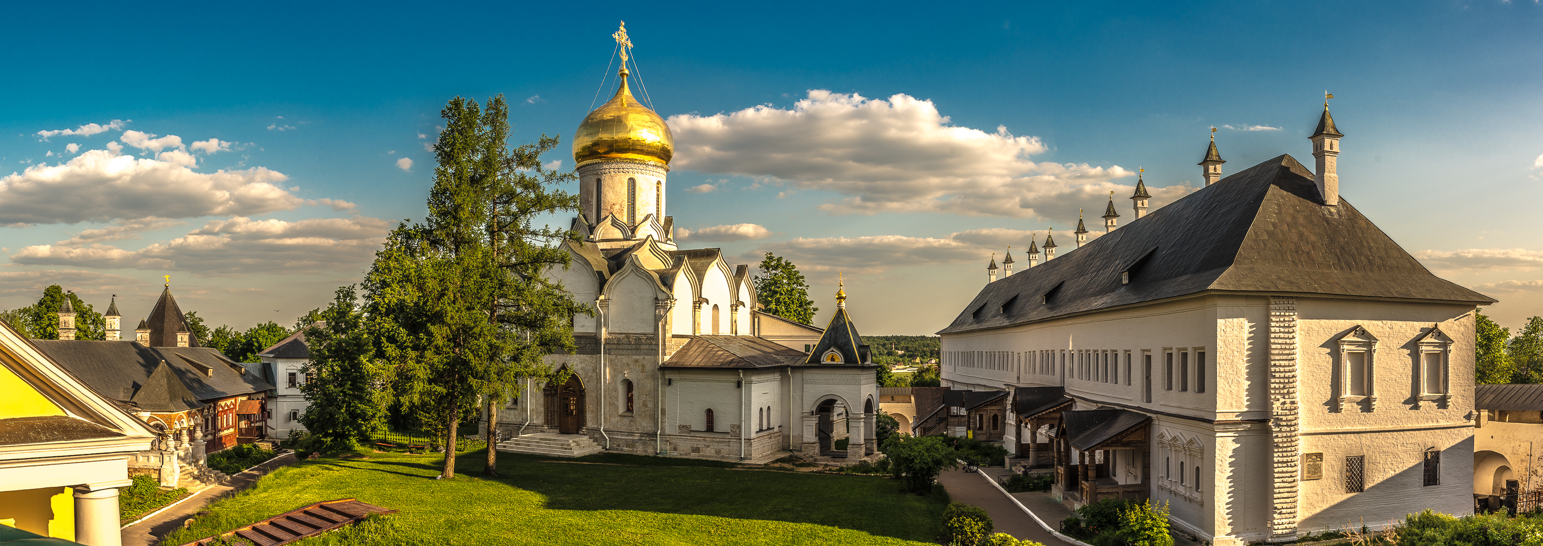 Собор Рождества Пресвятой Богородицы: Саввинская слобода, Звенигород, Московская область